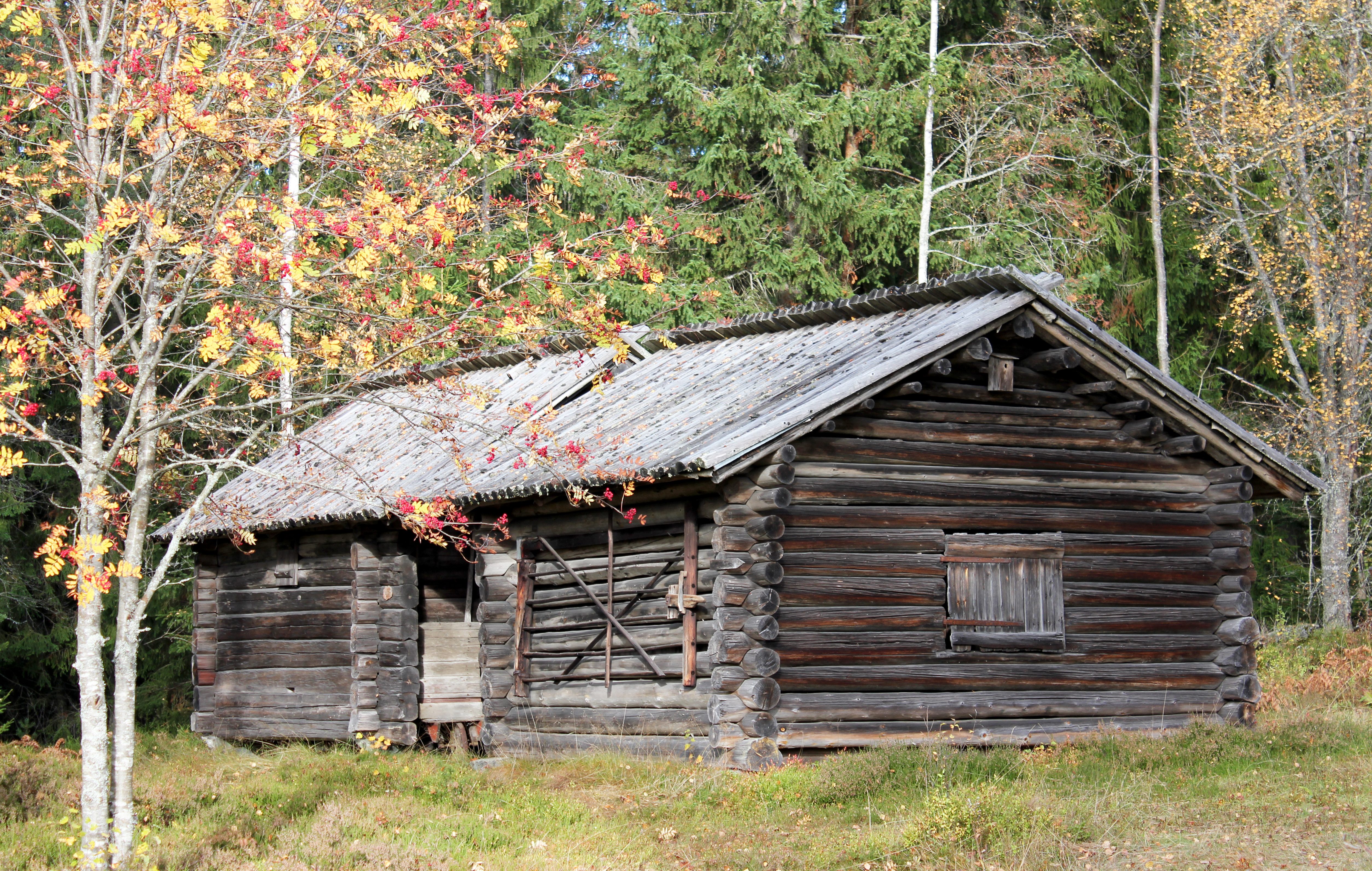 Garpenbergs gammelgård (Hembygdsgård). Hedemora, Garpenberg